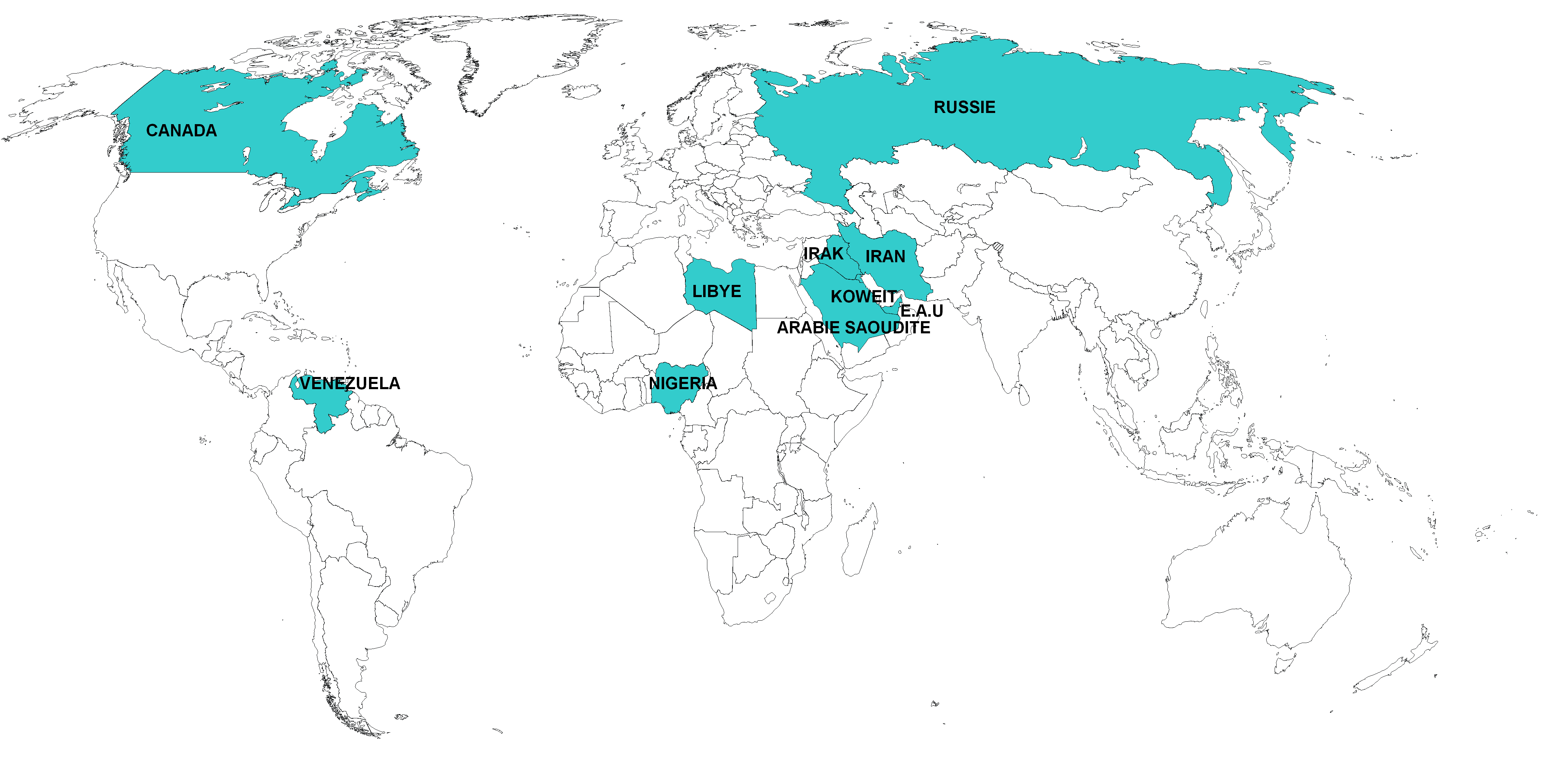 Carte présentant les 10 plus grands producteurs de pétrole à l'échelle de la planète